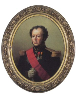 Portrait de Guillaume Latrille de Lorencez (1772-1855), général d'Empire.